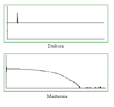 señal no determinista